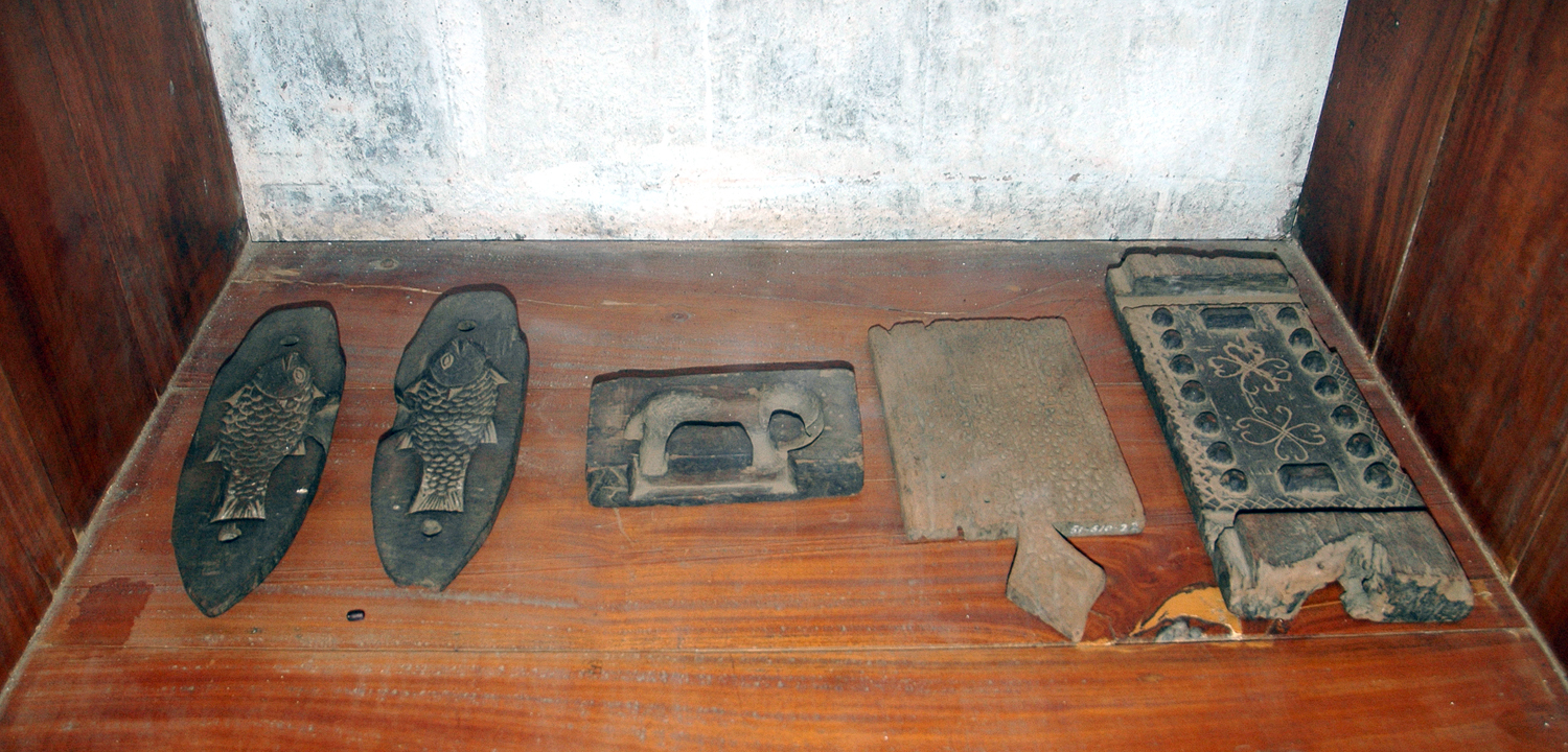 மர அச்சுக்கள் (சர்க்கரை, பலகாரம் செய்யப்பயன்படுத்தப்பட்டது - தொல் பொருட்காட்சிச்சாலை, யாழ்ப்பாணம்